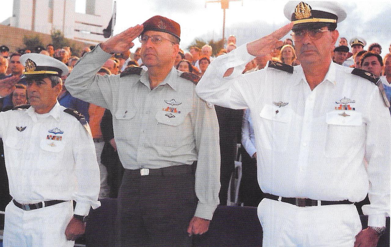 העברת פיקוד חיל הים מידידיה יערי לדוד בן בעש"ט 23 בספטמבר 2004.